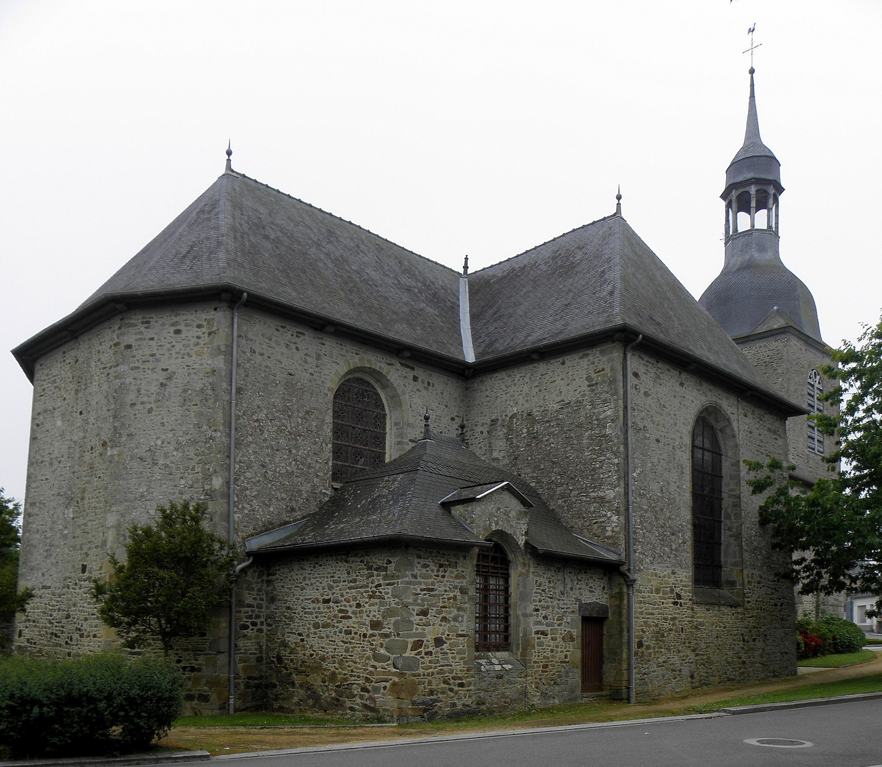 Chevet et flanc sud de l'église Saint-Ouen de Marcillé-Robert (35).